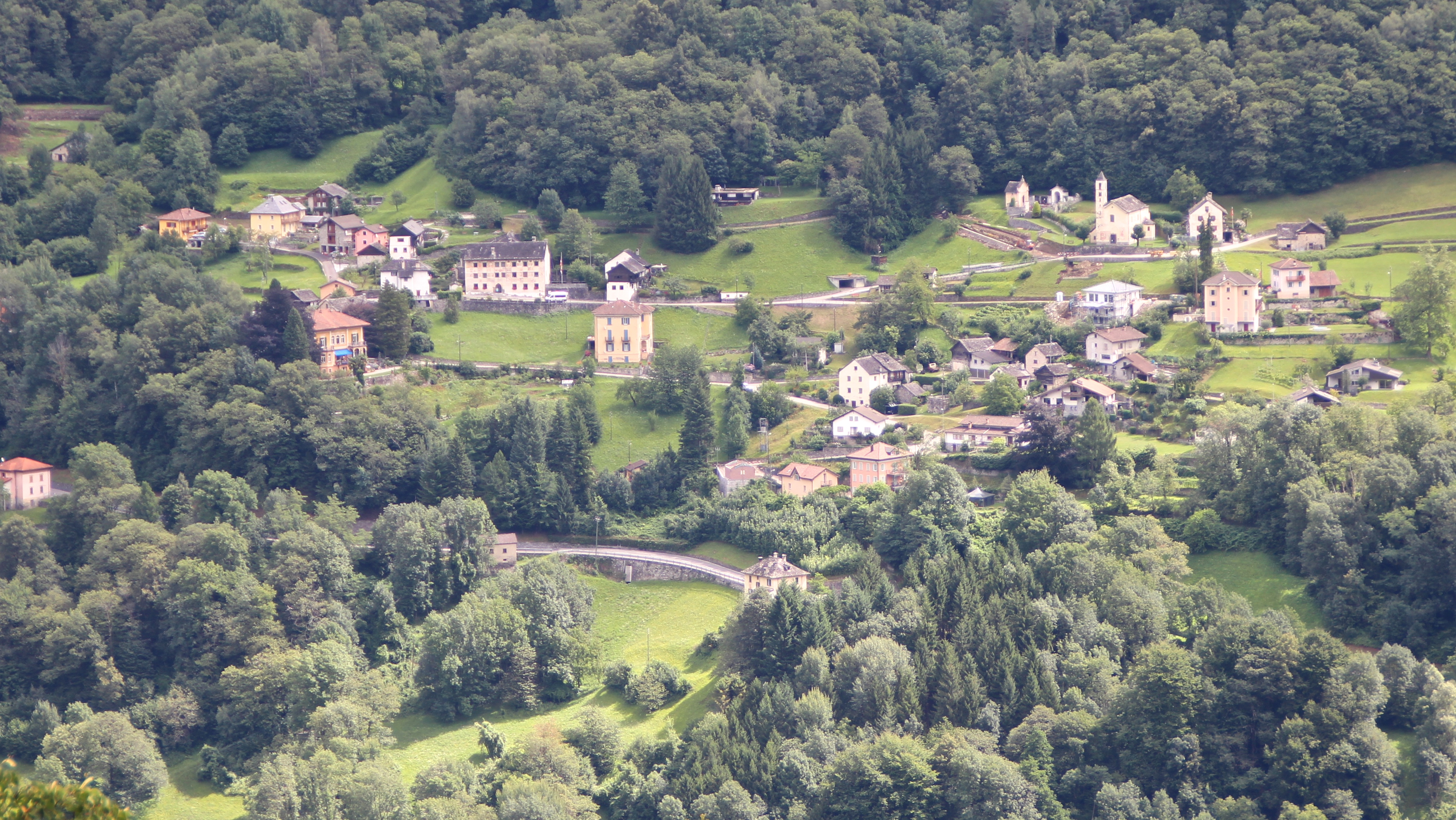 Lottigna, von Westen